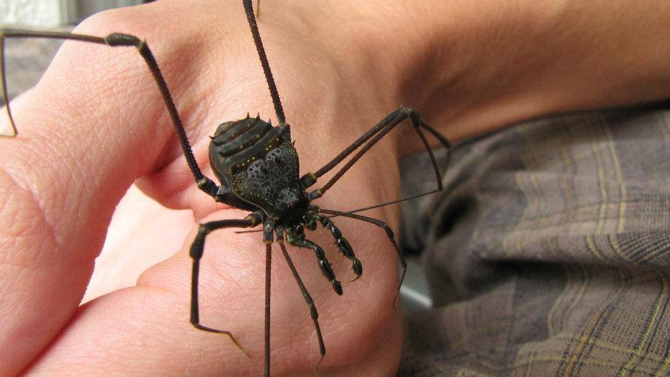 Serracutisoma pseudovarium Subordem Laniatores Família Gonyleptidae Subfamília Goniosomatinae